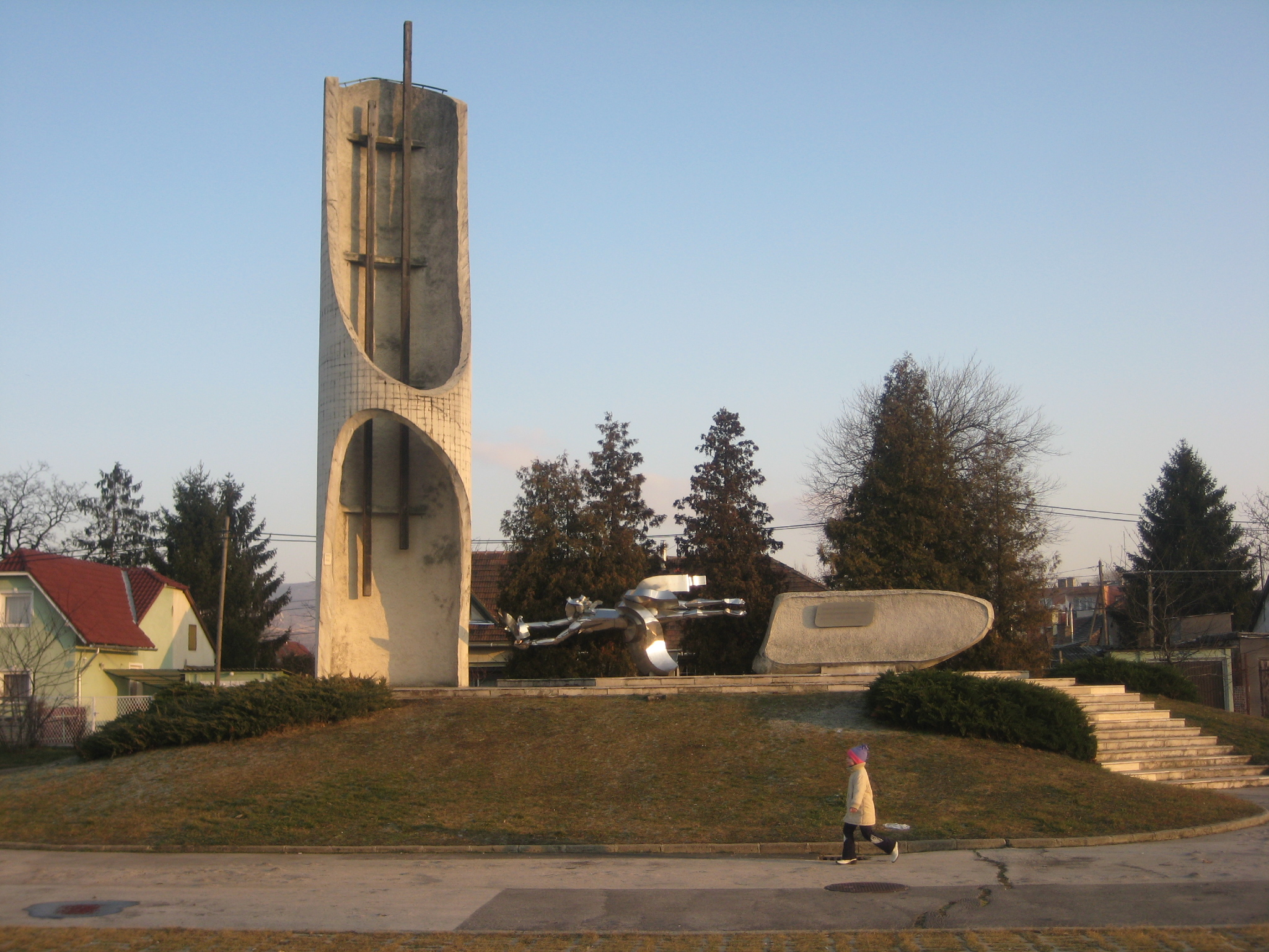 A dorogi szénmedence bányászatának 200 éves évfordulójára építették.